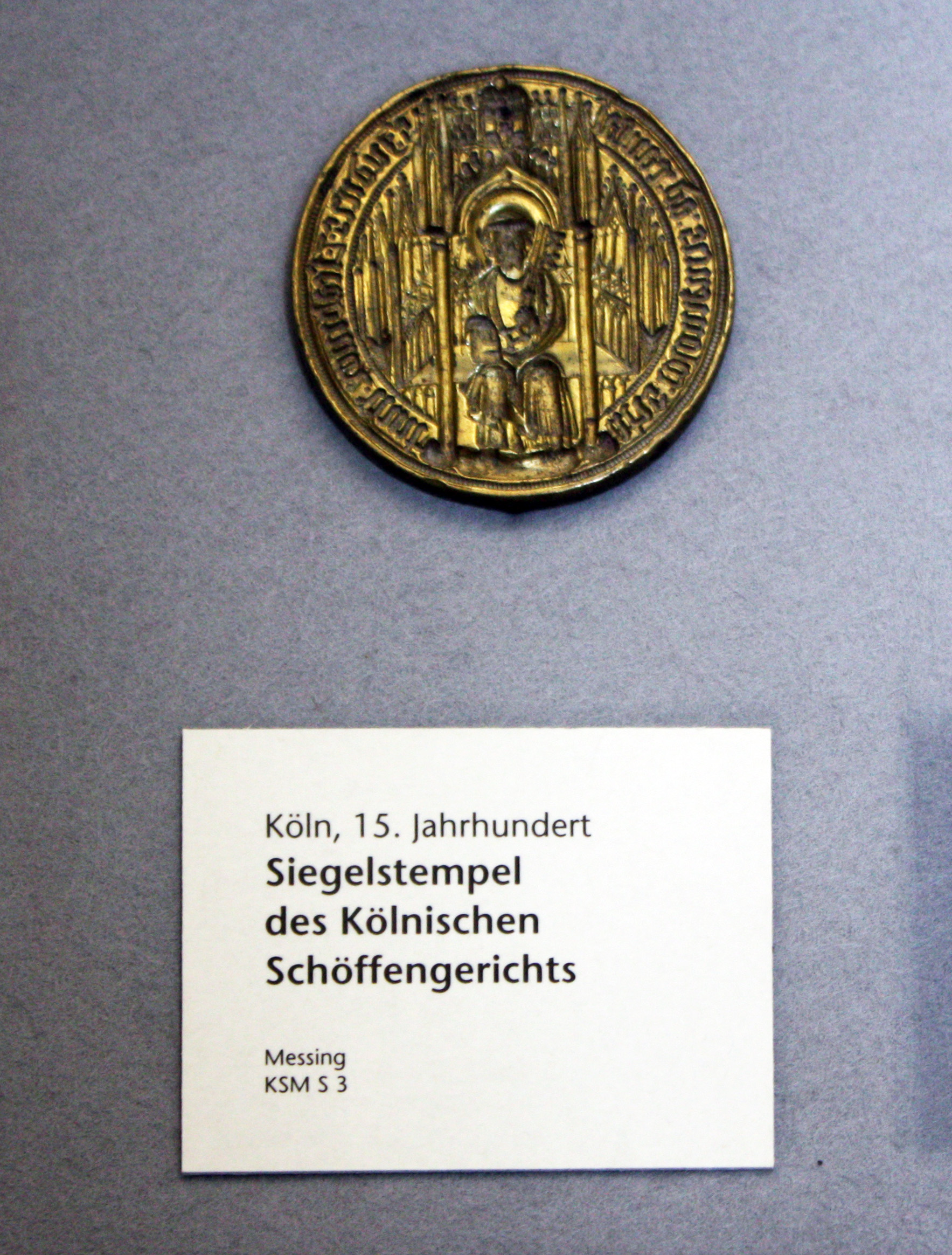 Kölner Siegelstempel des Schöffengerichts im 15. Jahrhundert (Zeughaus Köln)